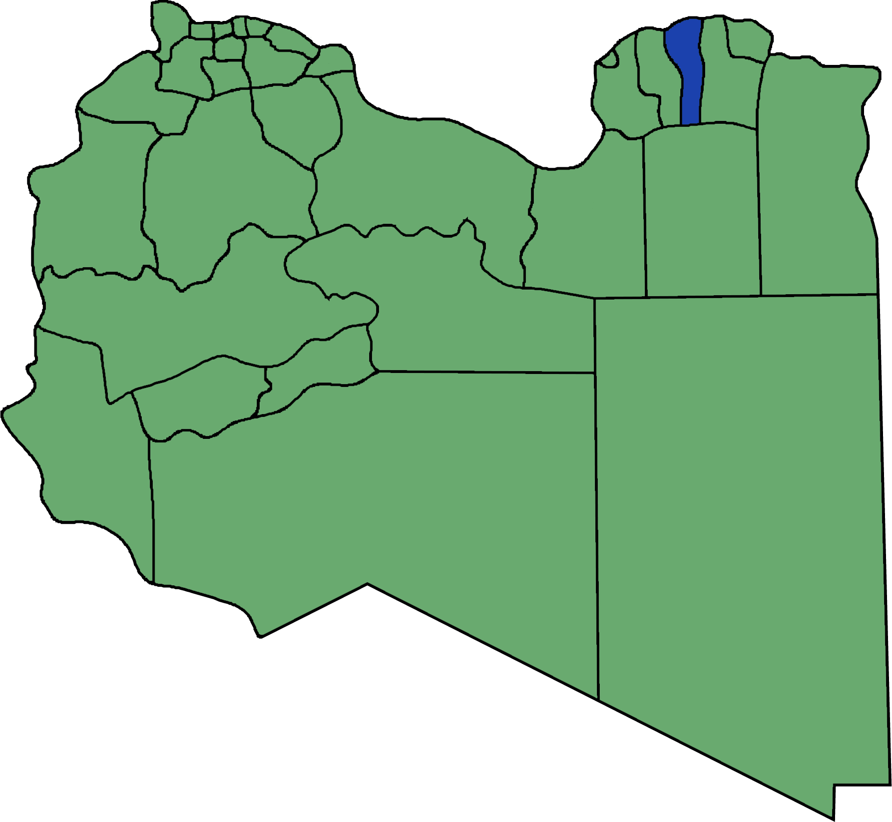 Die neuen Gemeinden (Munizipien) in Libyen. Al Jabal al Akhdar hervorgehoben.